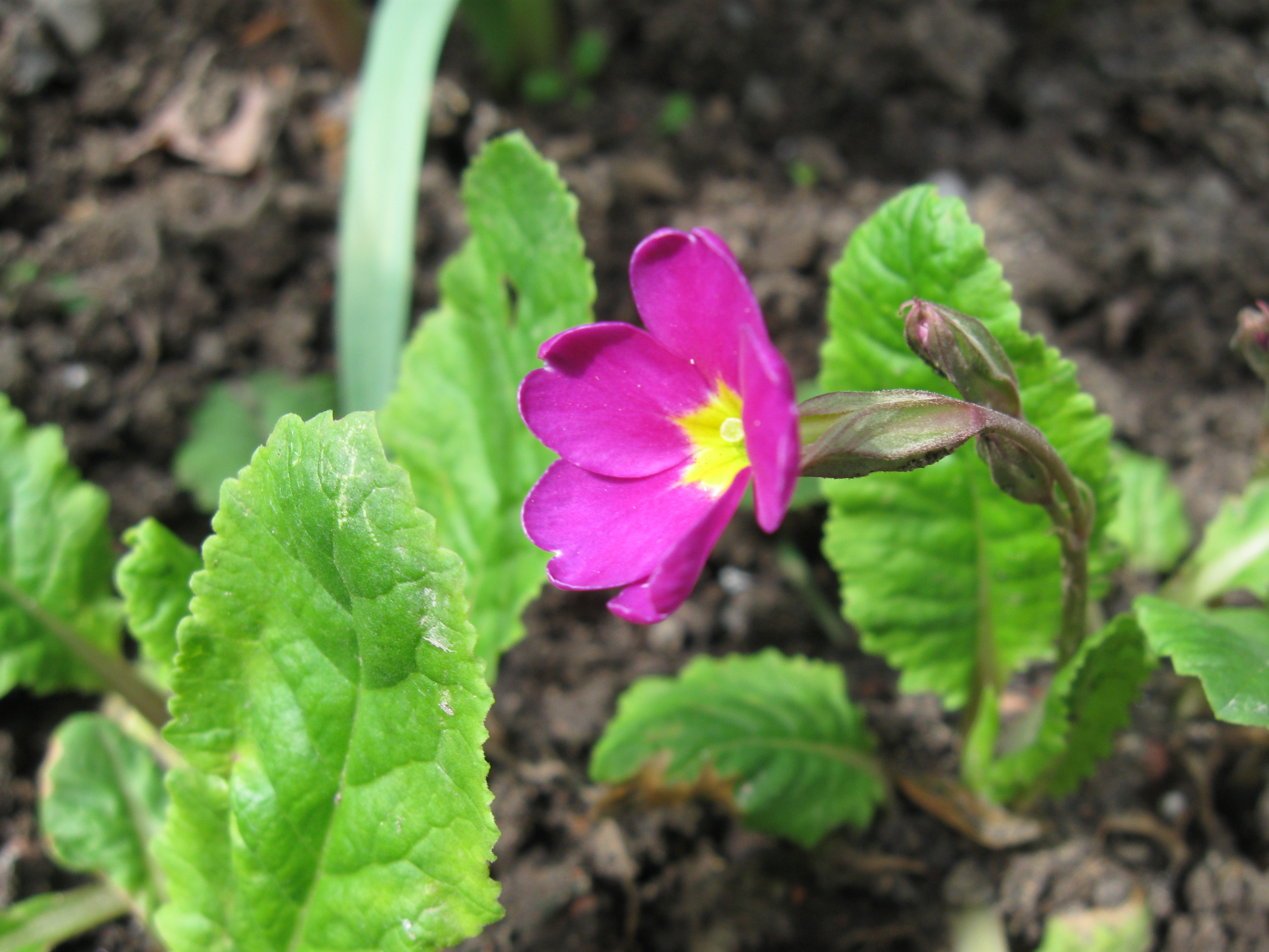 Primula vulgaris is a species of flowering plant in the family Primulaceae, native to western and southern Europe, northwest Africa (Algeria), and southwest Asia. Gyumri, Armenia.